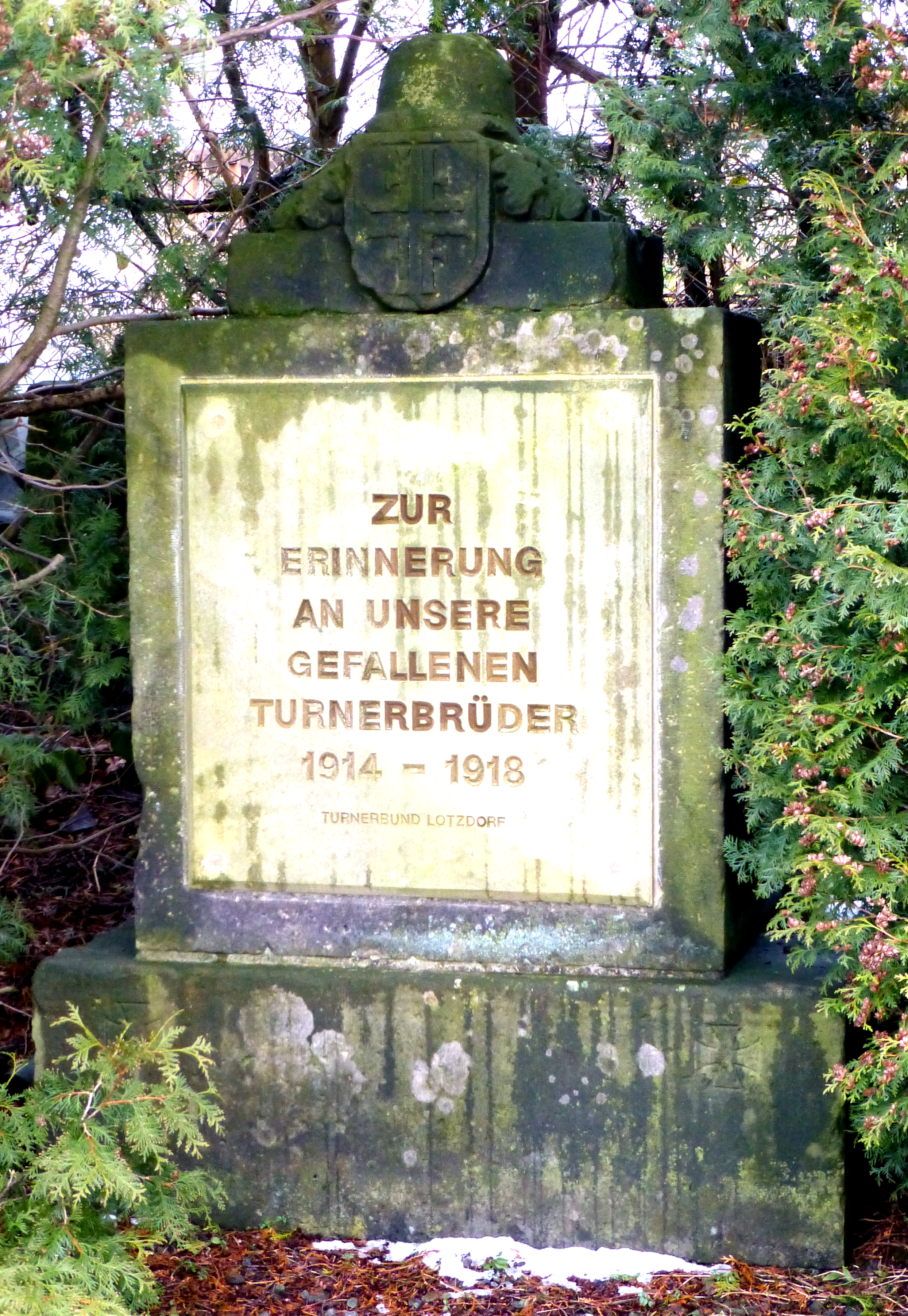 Kriegerdenkmal Turnerbund Lotzdorf 1. Weltkrieg